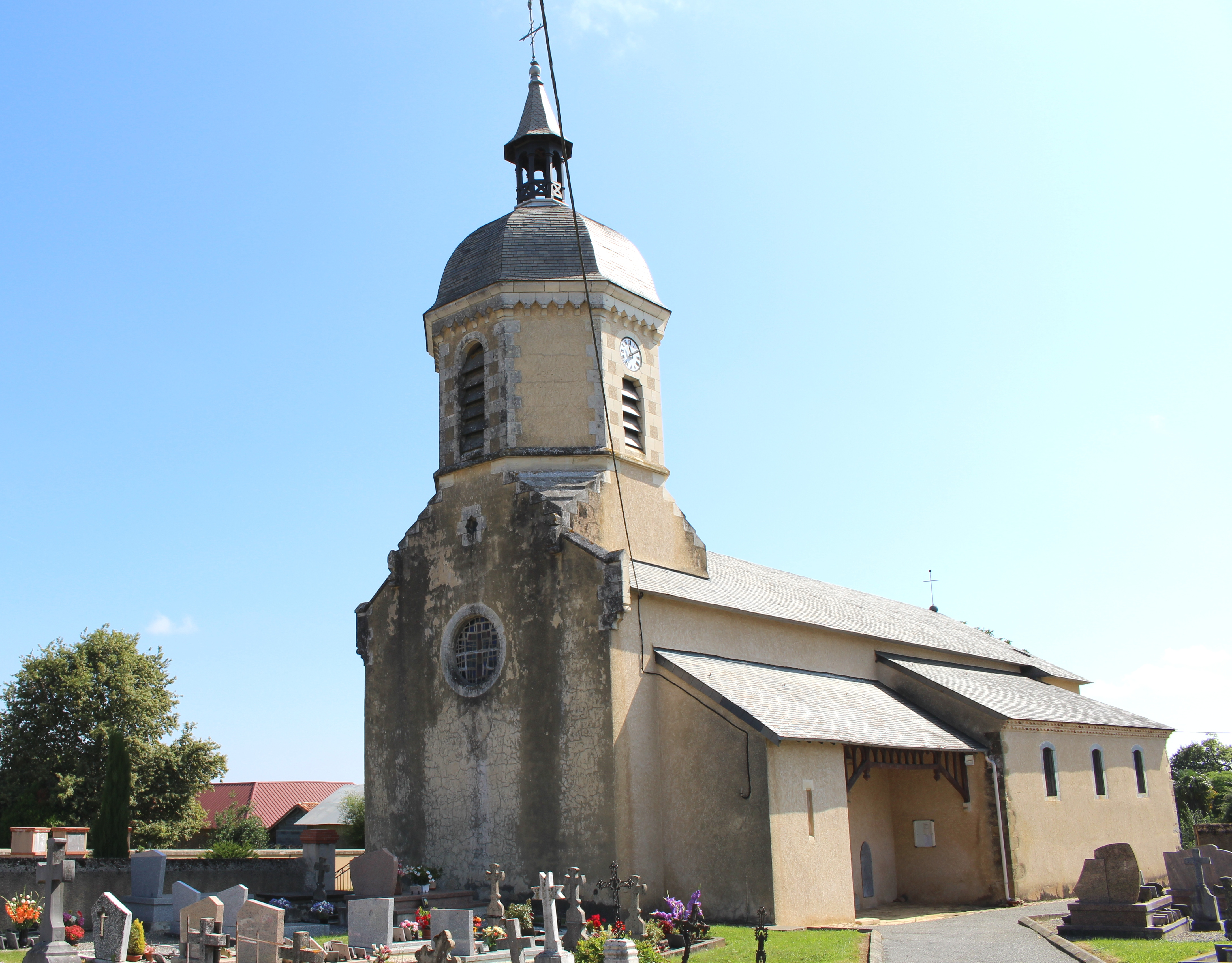 Église Saint-Jean-Baptiste de Castelbajac (Hautes-Pyrénées)